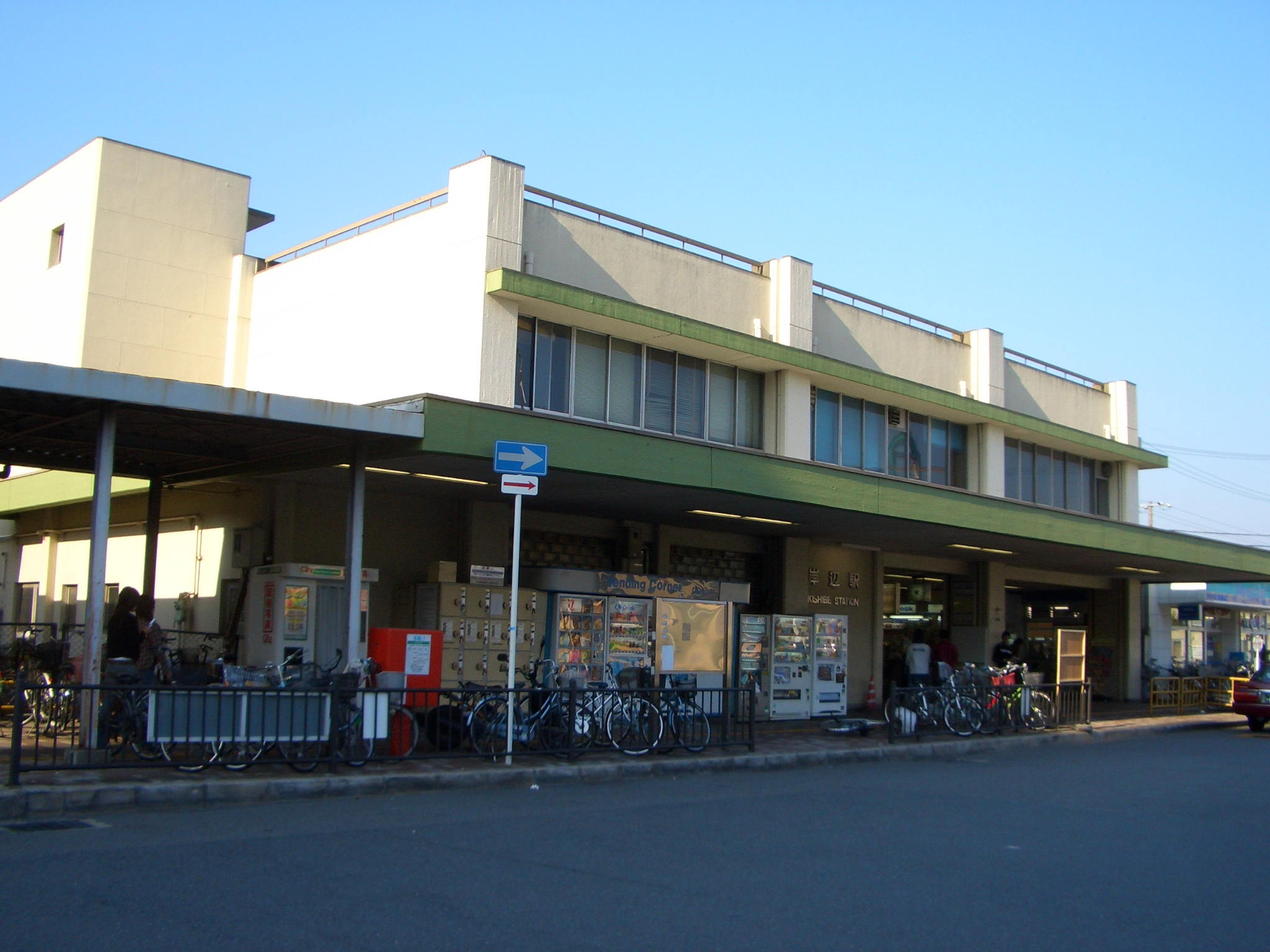 Kisibe_Station in Suita City,Osaka,Japan. 岸辺駅